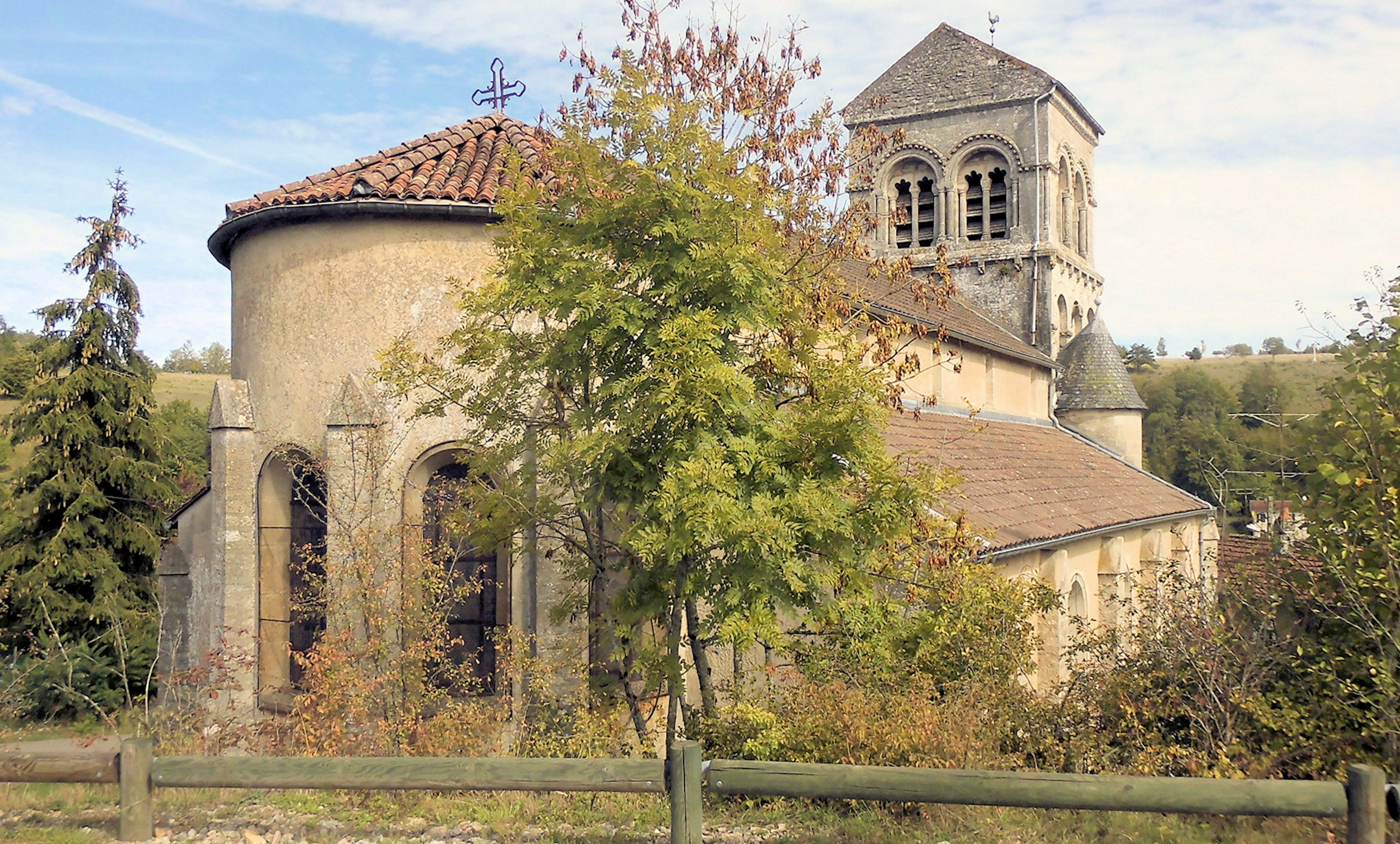 L'église Saint-Rémy à Rollainville, côté sud-ouest